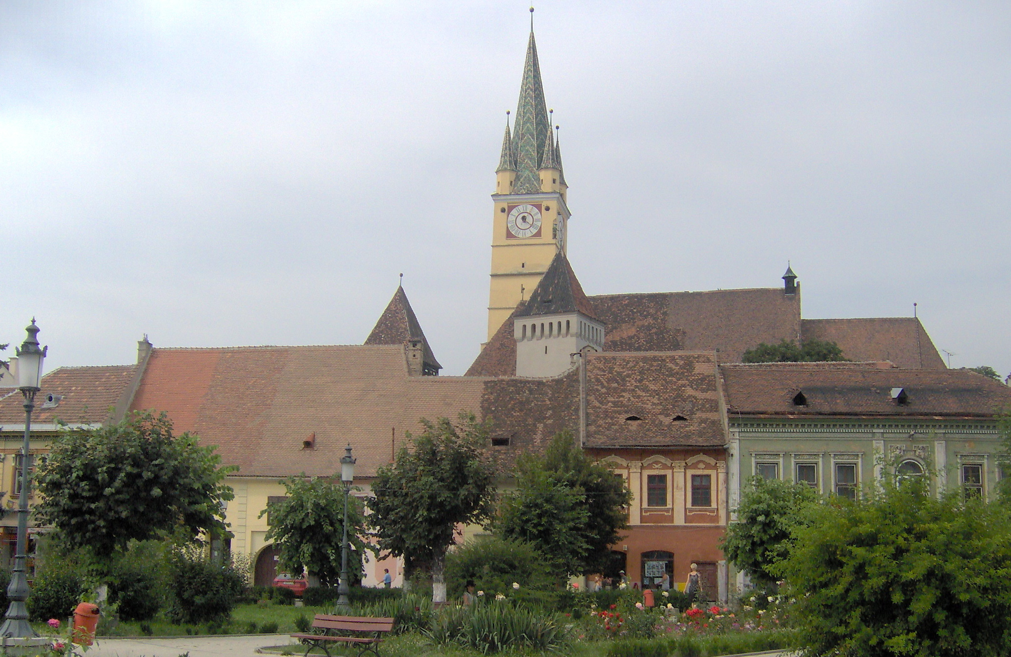 Own media.